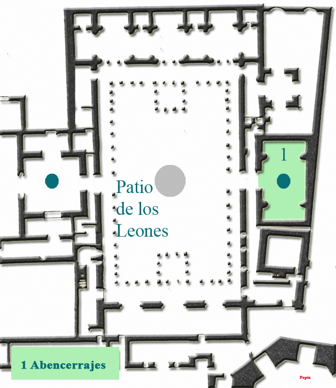 Plano situación de la sala de los Abencerrajes en la Alhambra de Granada - España